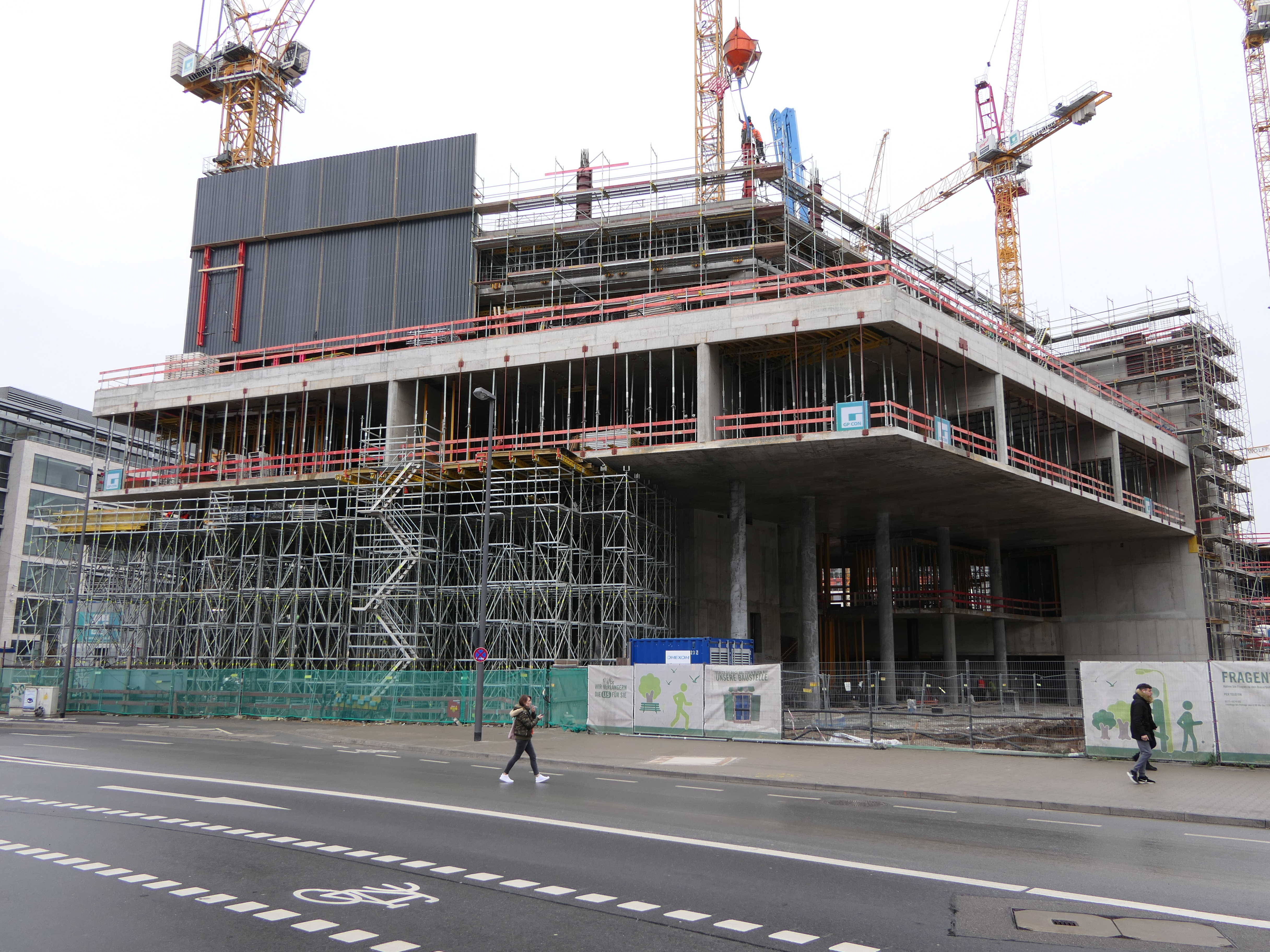 Baufortschritt am Spin Tower in Frankfurt im März 2020.